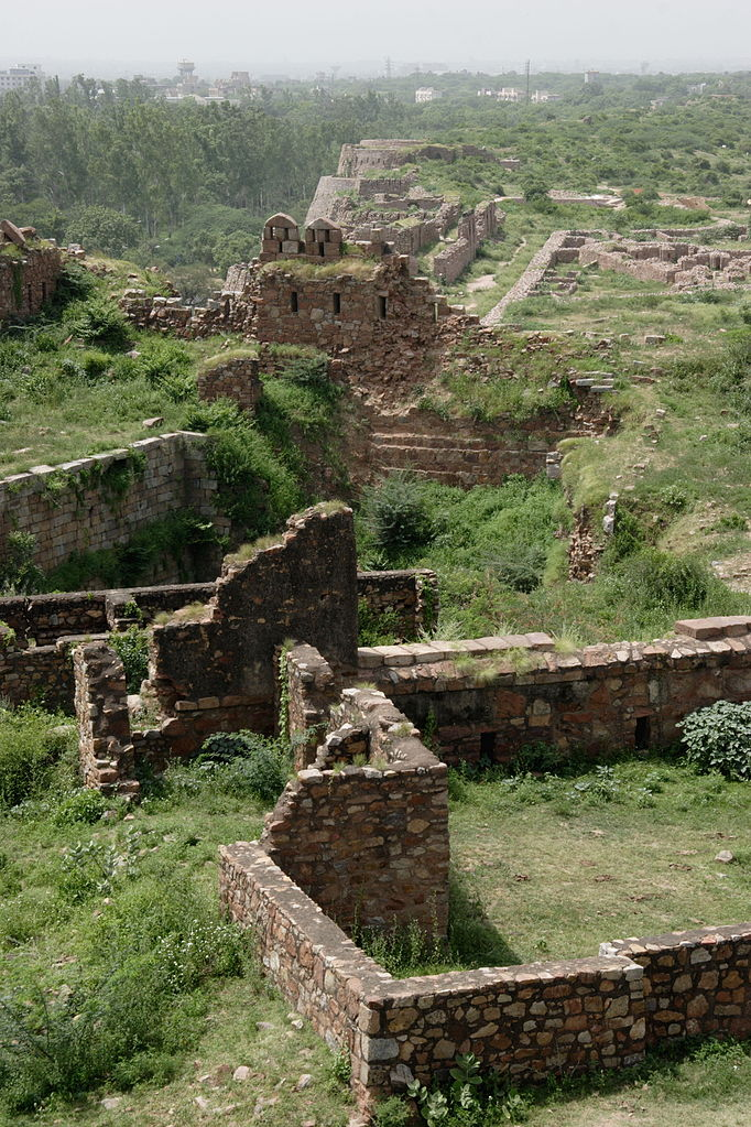 Фортификации крепости Туглакабад